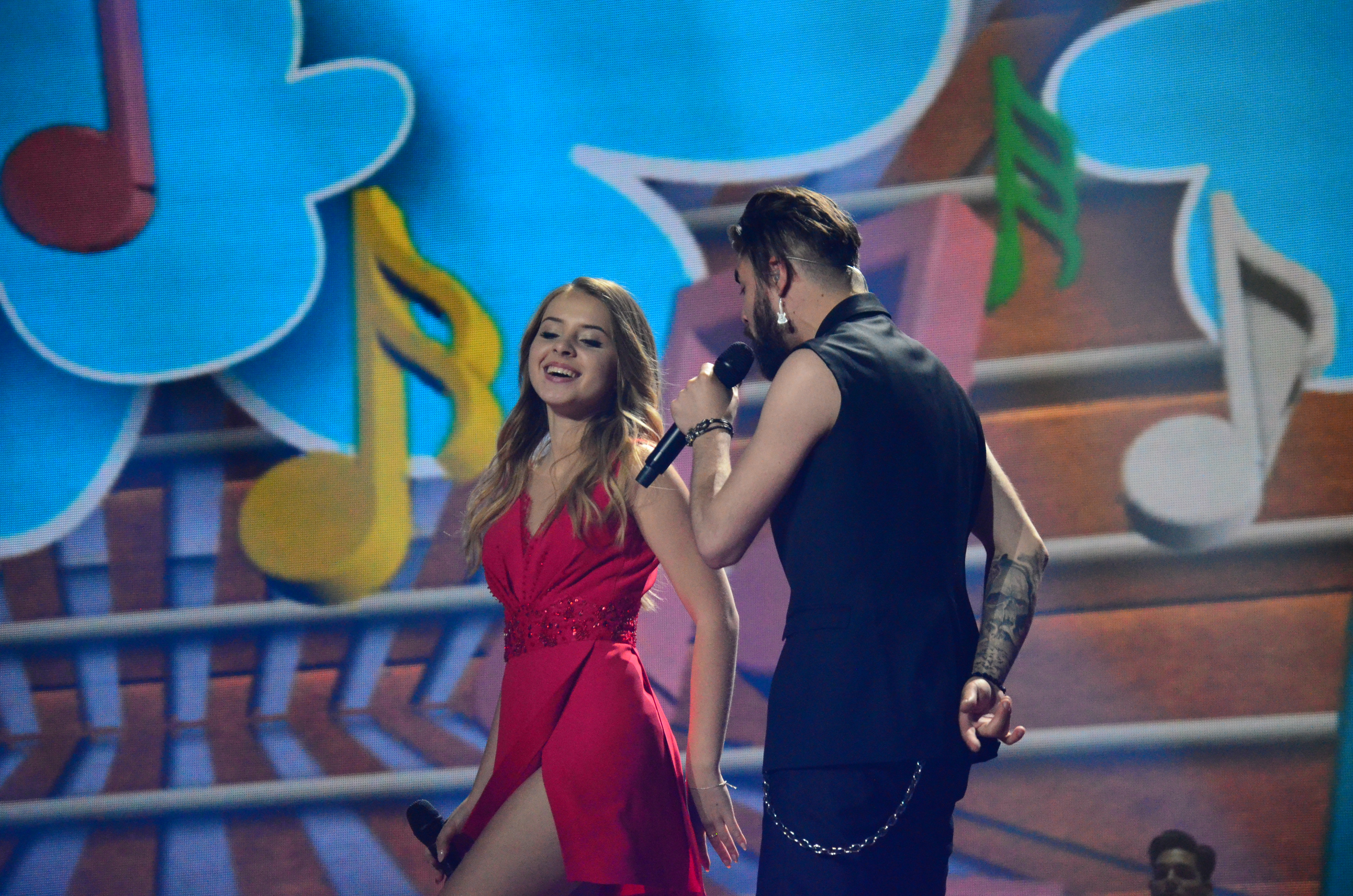 12 травня. Генеральна репетиція фіналу Євробачення 2017. Ilinca ft. Alex Florea (Romania)